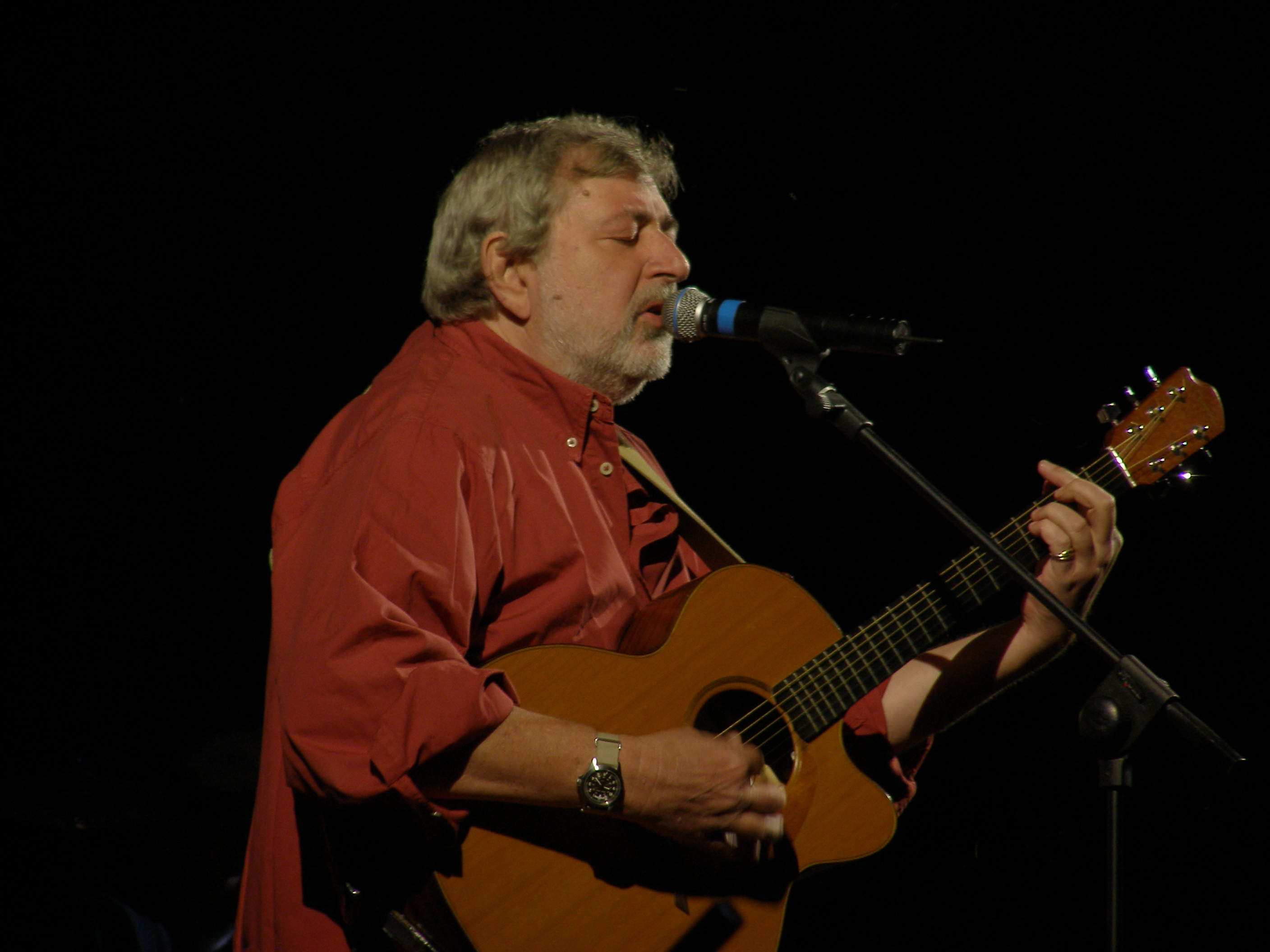 Francesco Guccini on stage